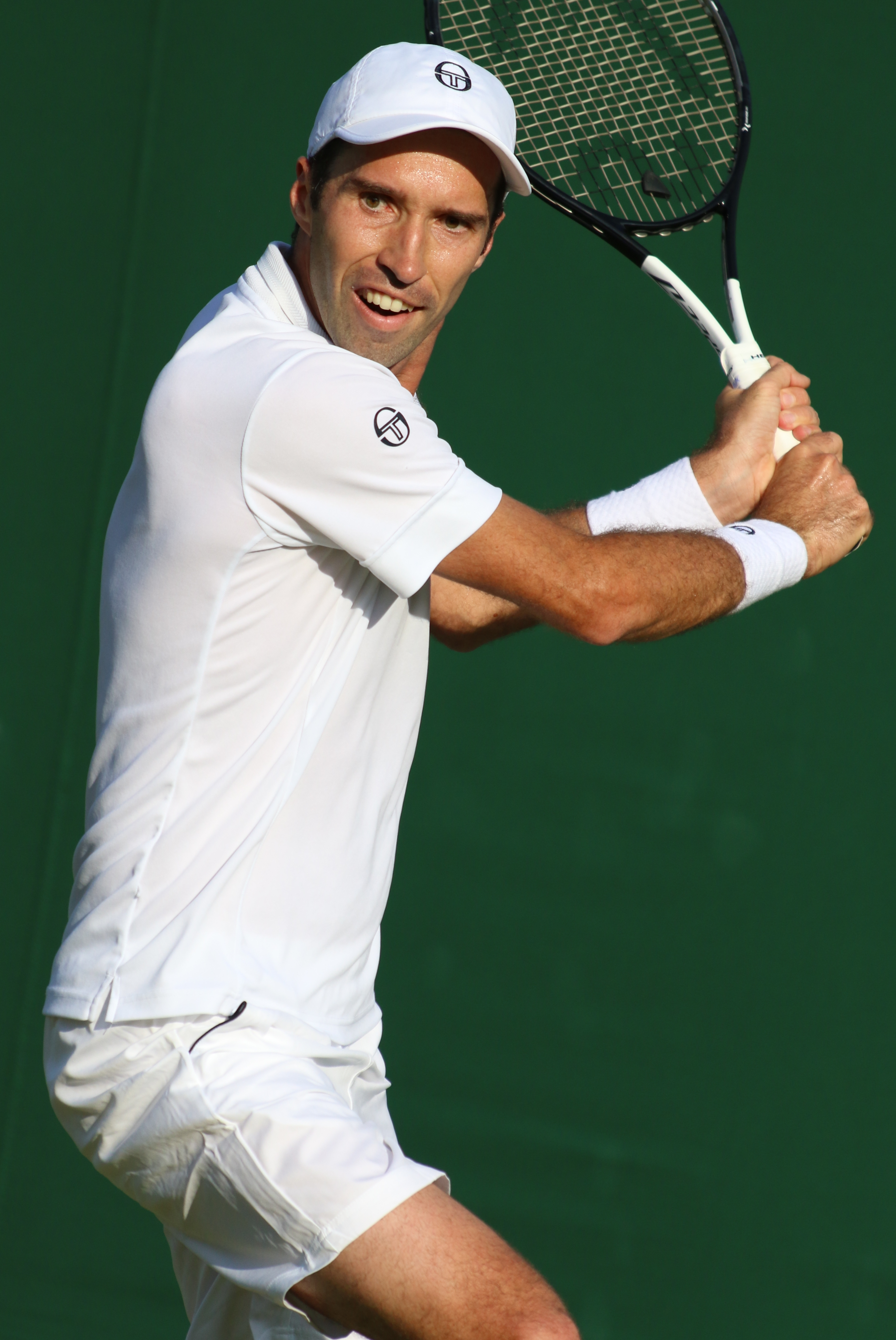 Kukushkin WM19 (19)